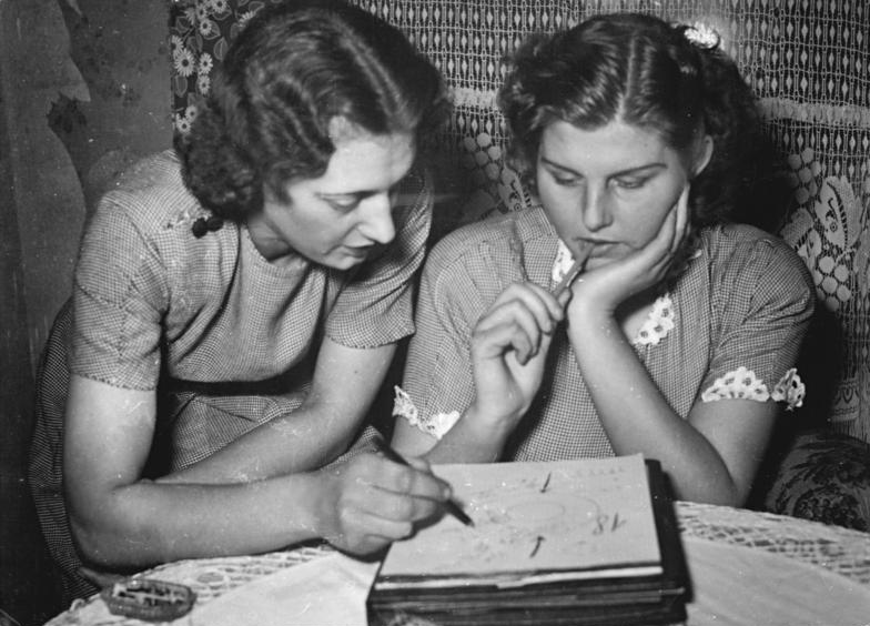 Berlin, Frauen beim Selbststudium, Weiterbildung Zentralbild Köhler 28.2.1952 Knobloch Zum Internationalen Frauentag. Im VEB Wälzlager in Berlin-Lichtenberg wurde die Brigadierin und Aktivistin Irmgard Korbstein zur Prämiierung am Internationalen Frauentag vorgeschlagen. Irmgard Korbstein war 8 Jahre als Schleiferin tätig und bewies durch mehrere freiwillige Normerhöhungen von durchschnittlich 10 und 15% ihre fortschrittliche Einstellung zur Arbeit. Im vergangenen Jahr wurde sie- obwohl einige männliche Kollegen dies nicht für möglich hielten- zur ersten Einrichterin des Betriebes. Zu Ehren des 34. Jahrestages der Grossen Sozialistischen Oktoberrevolution bildete sie die erste Frauenbrigade des Betriebes, die Brigade "7. November". Diese Brigade war der Anlass, dass auch andere Kollegen sich zu insgesamt 7 Brigaden -"Karl Marx", "Ernst Kamieth" usw.) zusammenschllossen. Es ist der besondere Verdienst der Kollegin Korbstein, dass die Brigade "7. November" ständig ihre Norm mit 115 bis 120% übererfüllt. UBz: Seit mehreren Monaten beschäftigt sich Irmgard Korbstein (links) mit der beruflichen Weiterbildung ihrer Kollegin Anita Hetscher, die ebenfalls in der Brigade "7. November" arbeitet. Kollegin Hetscher eignete sich bald die notwendigen Fachkenntnisse an und ist heute selbst als Einrichterin in einer anderen Brigade tätig.